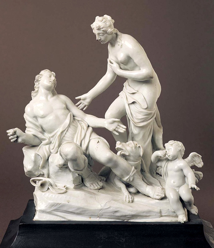 Venere e Adone, gruppo plastico in porcellana. Ginori a Doccia 1745